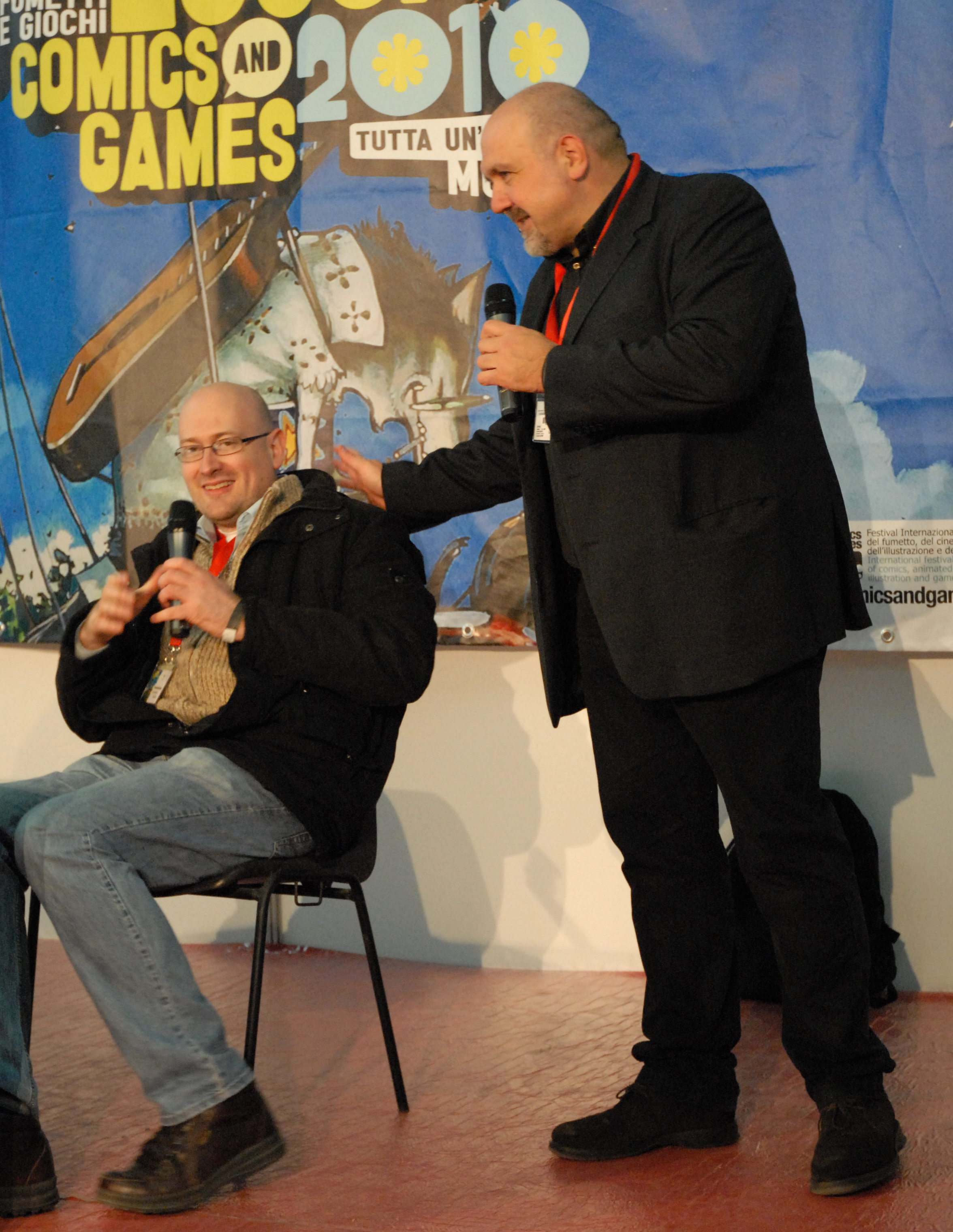 Andrea Plazzi e Giovanni Russo allo Showcase di apertura dell'evento Photo taken during Lucca Comics&Games 2010